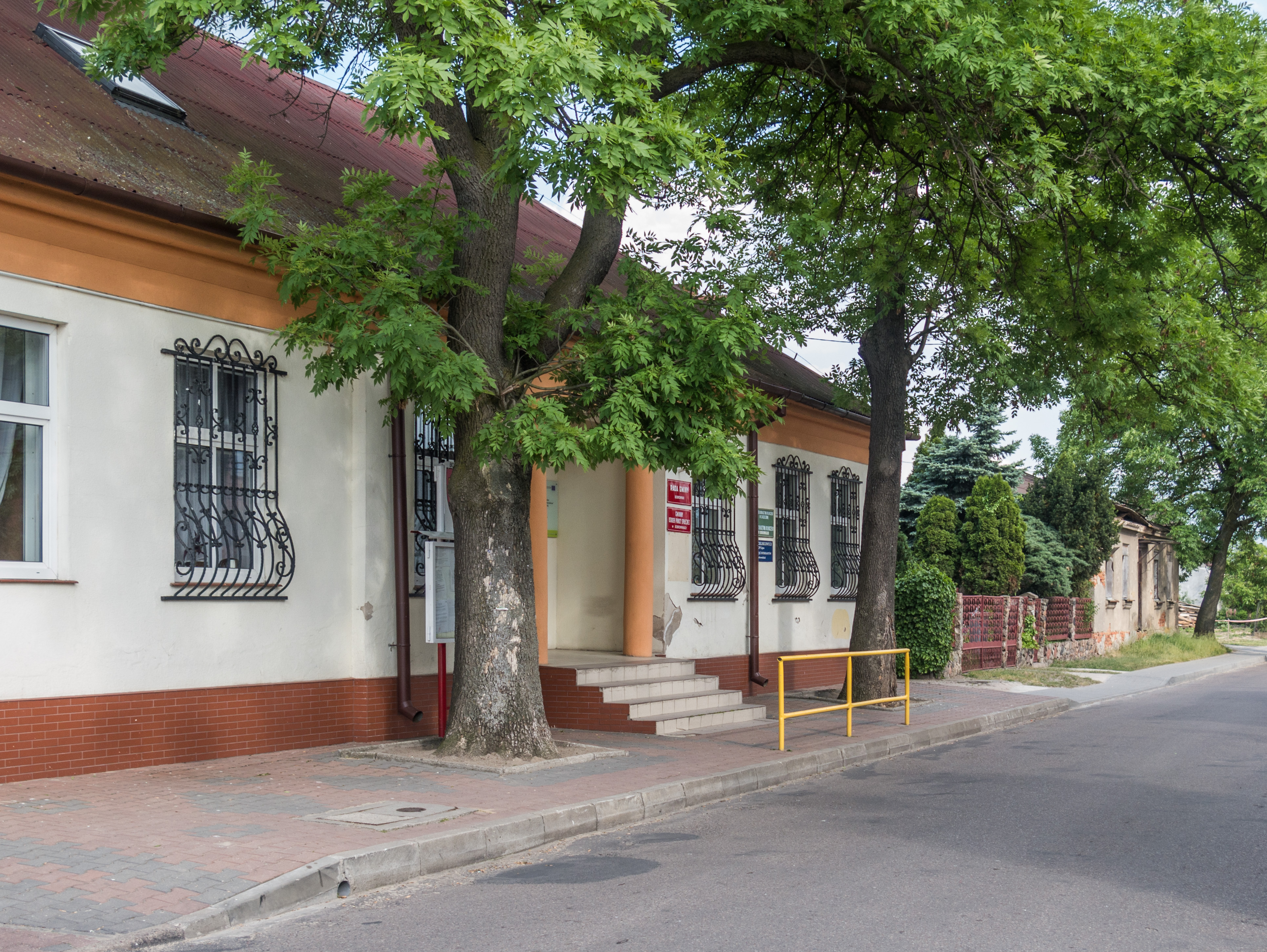 Dawny budynek mieszkalno-administracyjny magazynów soli, 1835, obecnie Urząd Gminy w Bobrownikach, ul. Nieszawska 8